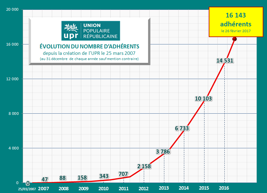 Graphique représentant le nombre d'adhérent de l'Union Populaire Républicaine depuis sa création (source : site de l'UPR).